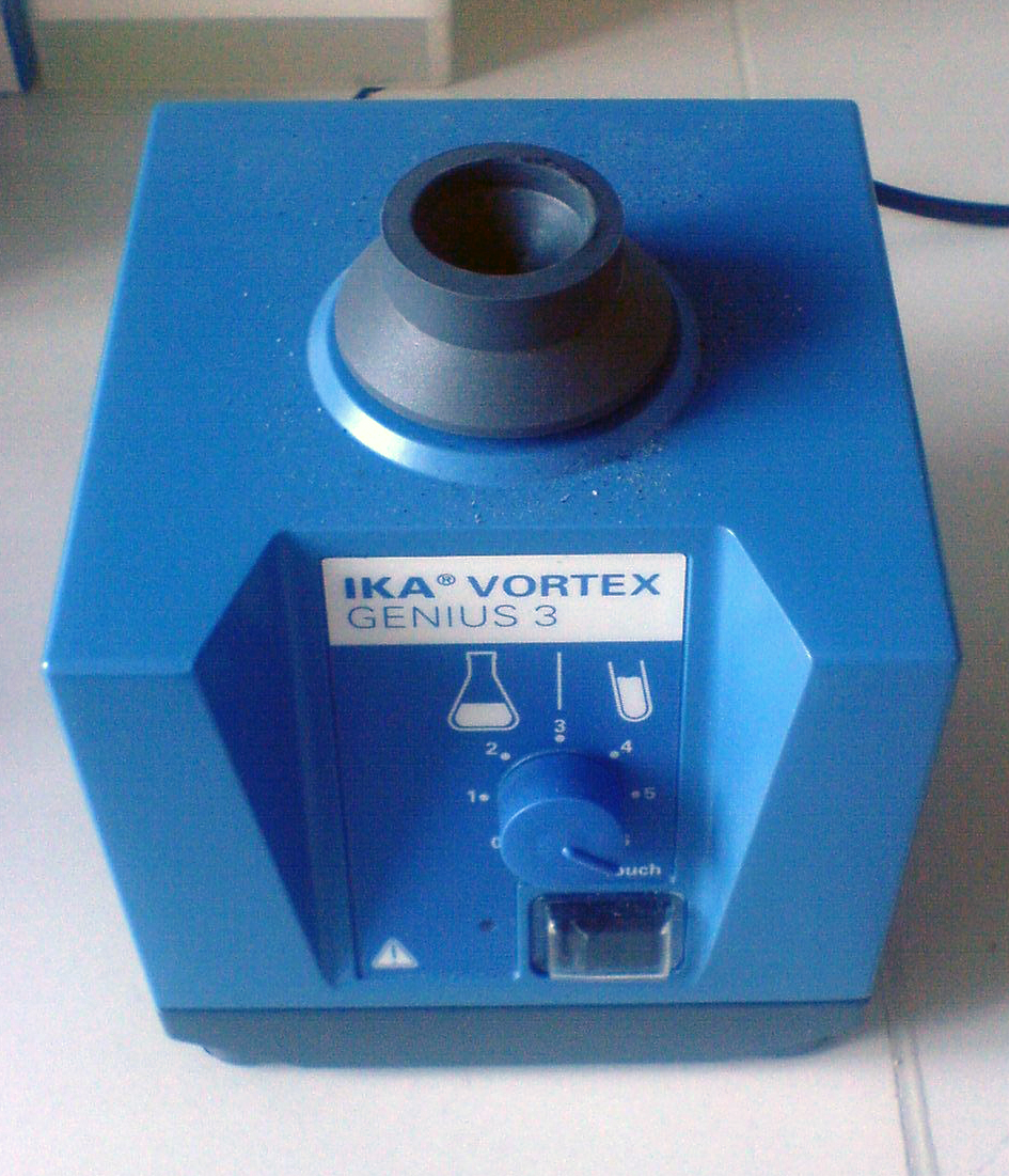 Vortex zur Durchmischung von Reaktionsansätzen